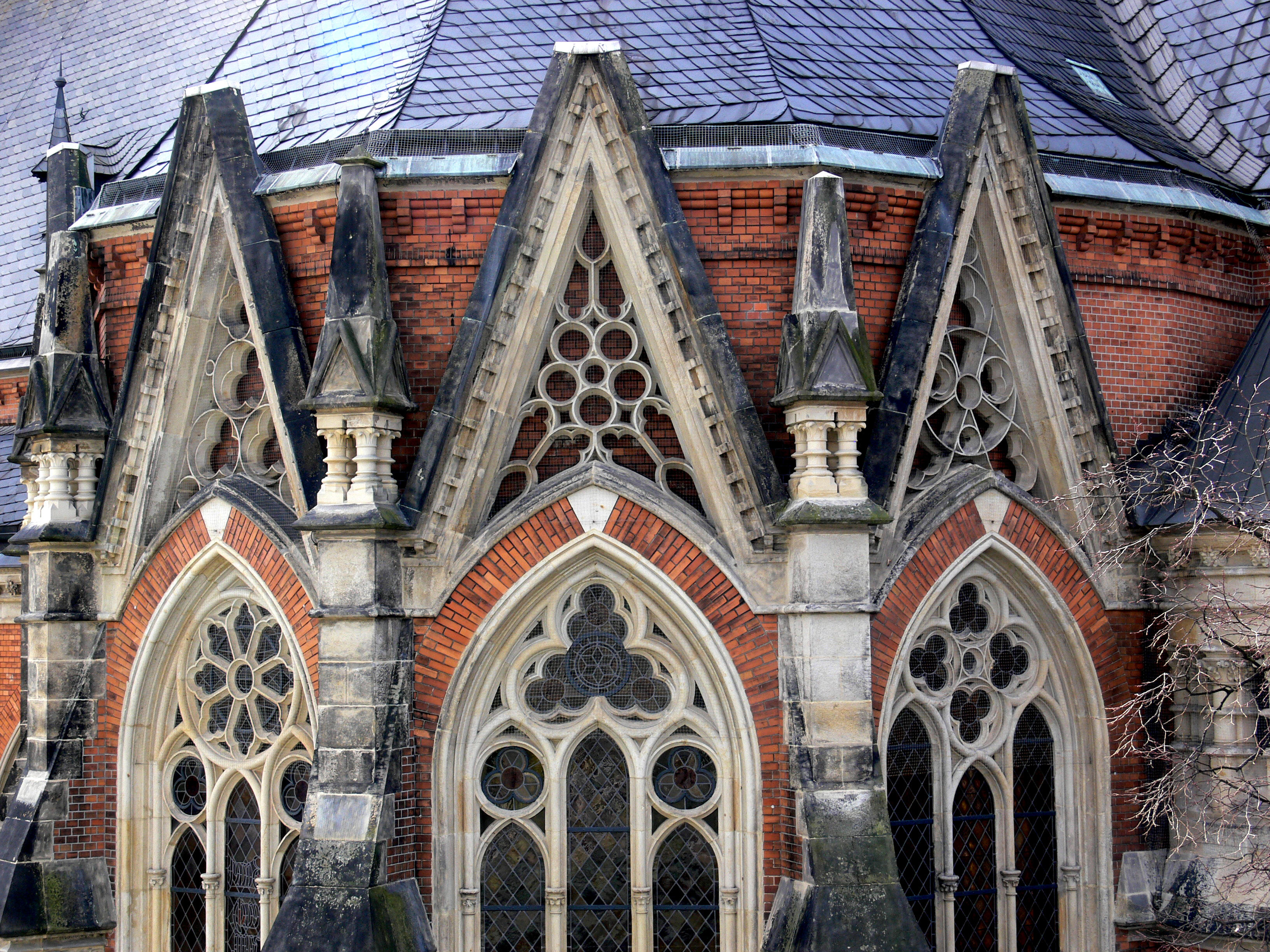 Chemnitz, St.-Petri-Kirche, Detail